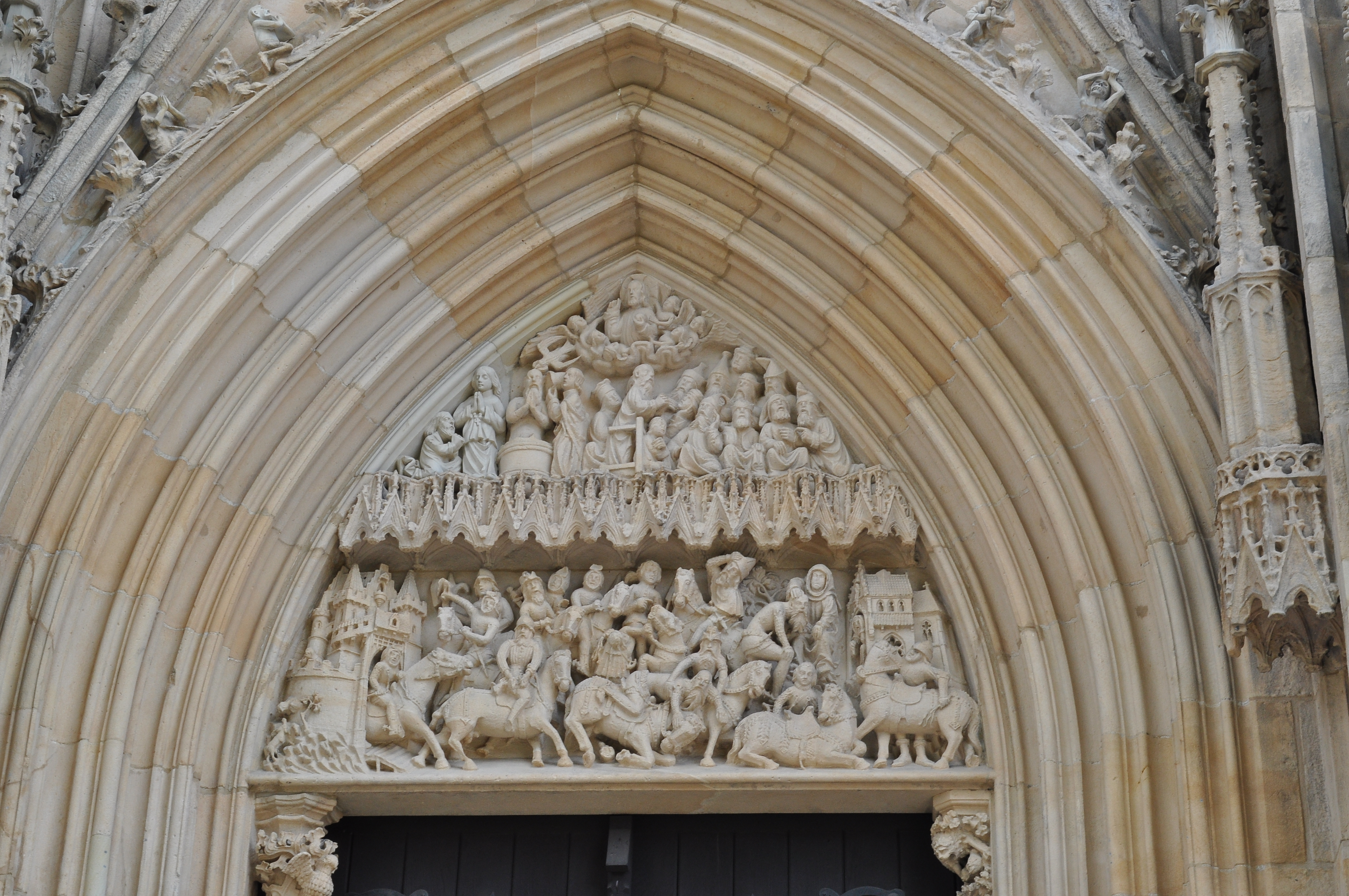 Bazylika Świętych Apostołów Piotra i Pawła